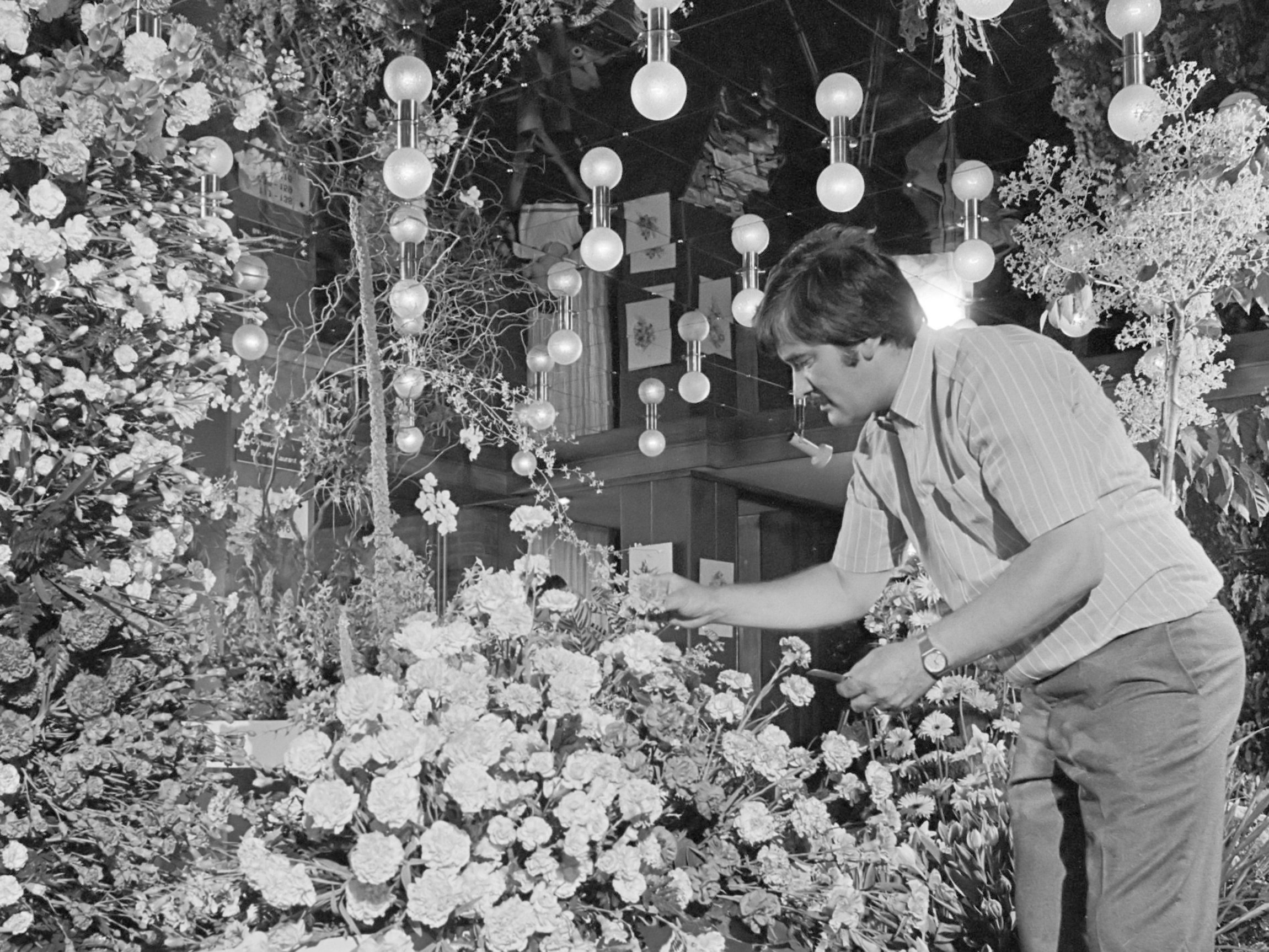 Bloemsierkunstenaar Johan Weisz maakt een enorm bloemstuk voor in het Sheraton Schipholhotel 26 augustus 1983